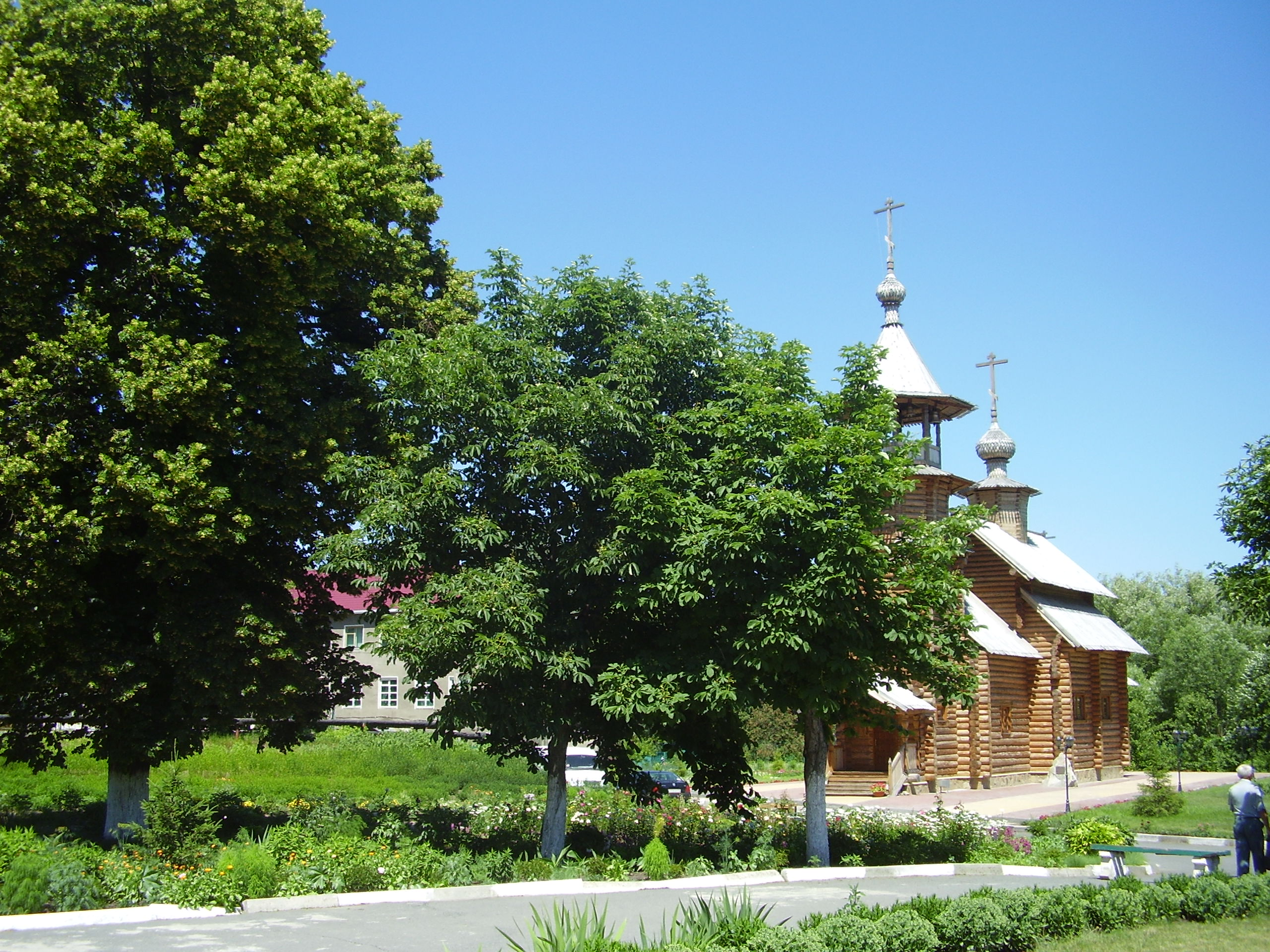 Старый Оскол. На территории Александро-Невского собора